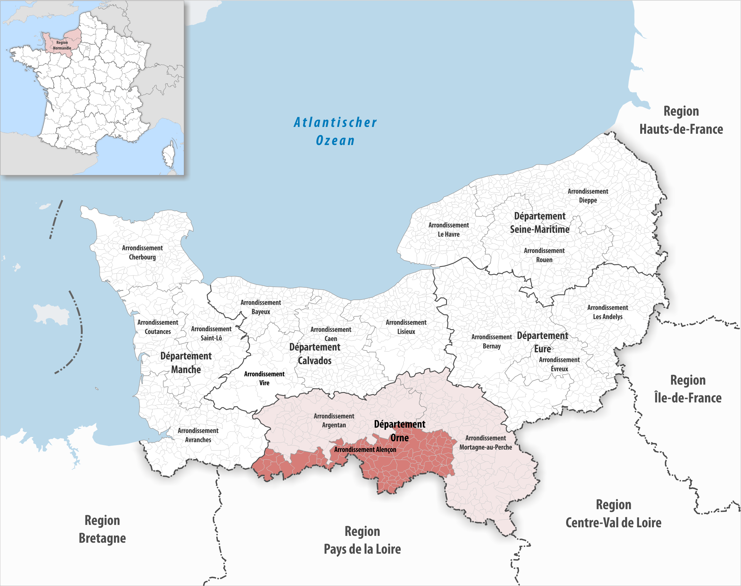 Lage des Arrondissements Alençon